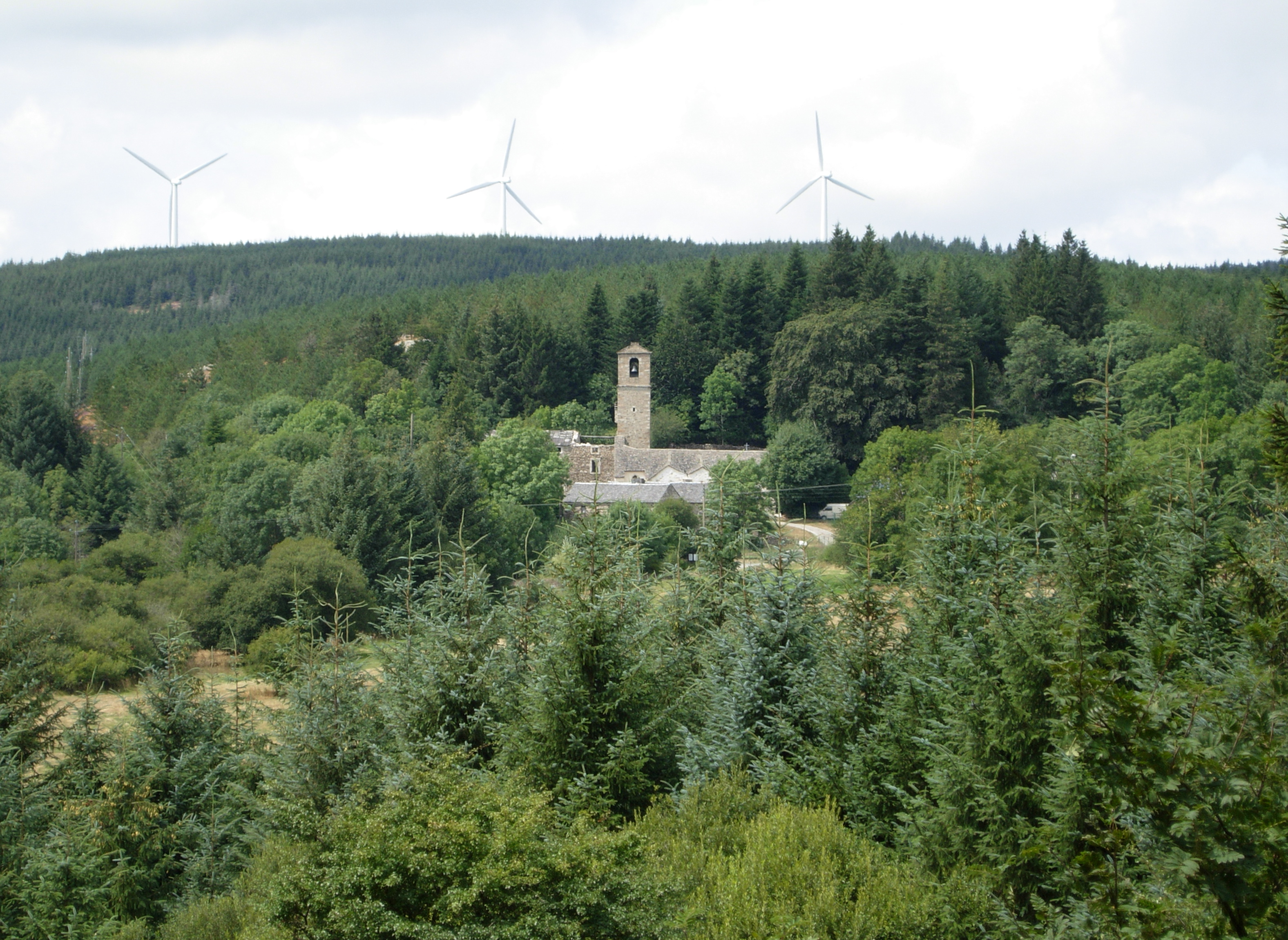 Cambon-et-Salvergues (Hérault) - Vue sur Salvergues et les éoliennes.